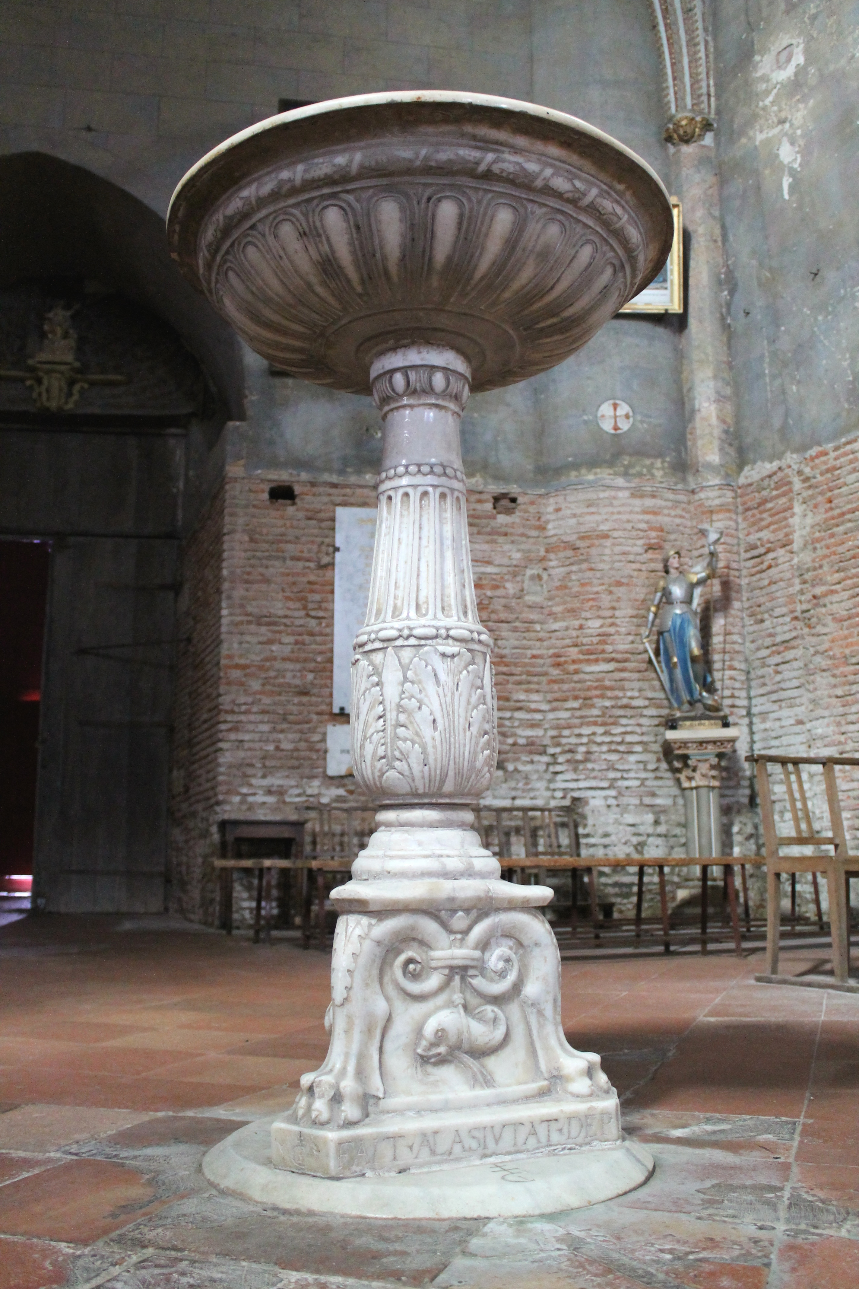 Bénitier, nef